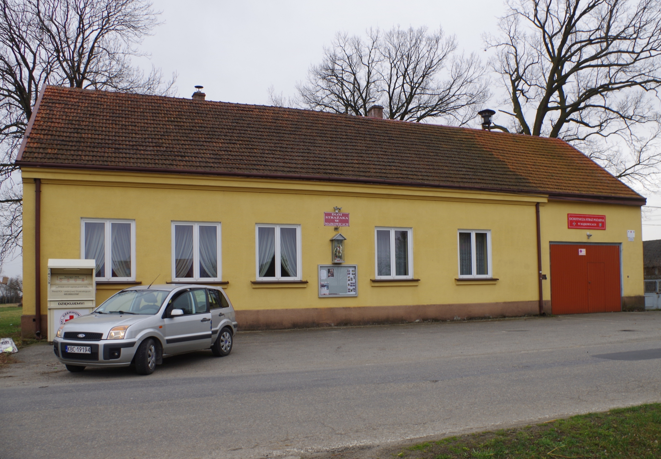 Dom Strażaka w Majkowicach